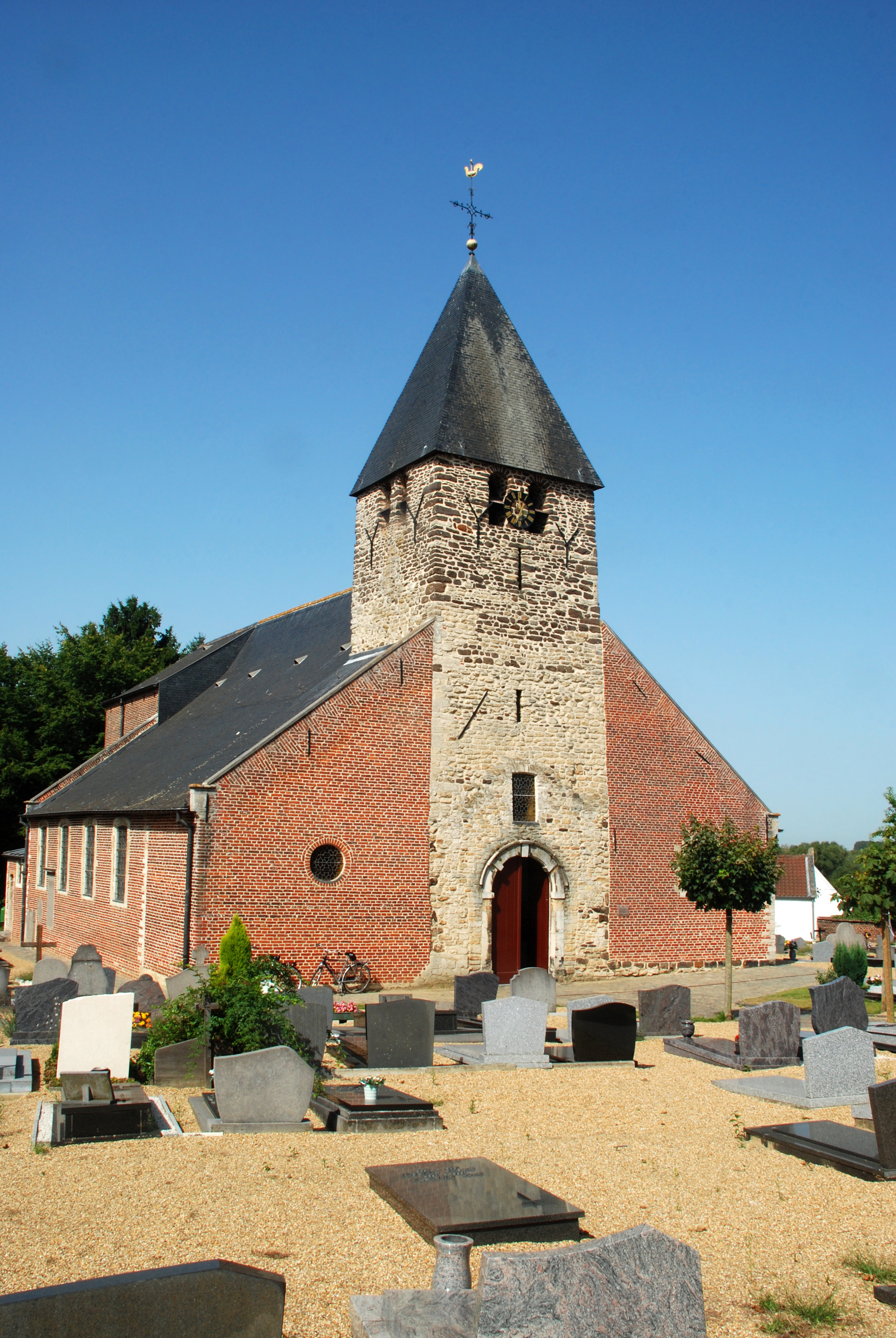 Belgique - Brabant flamand - Église Sainte-Anne d'Oud-Heverlee